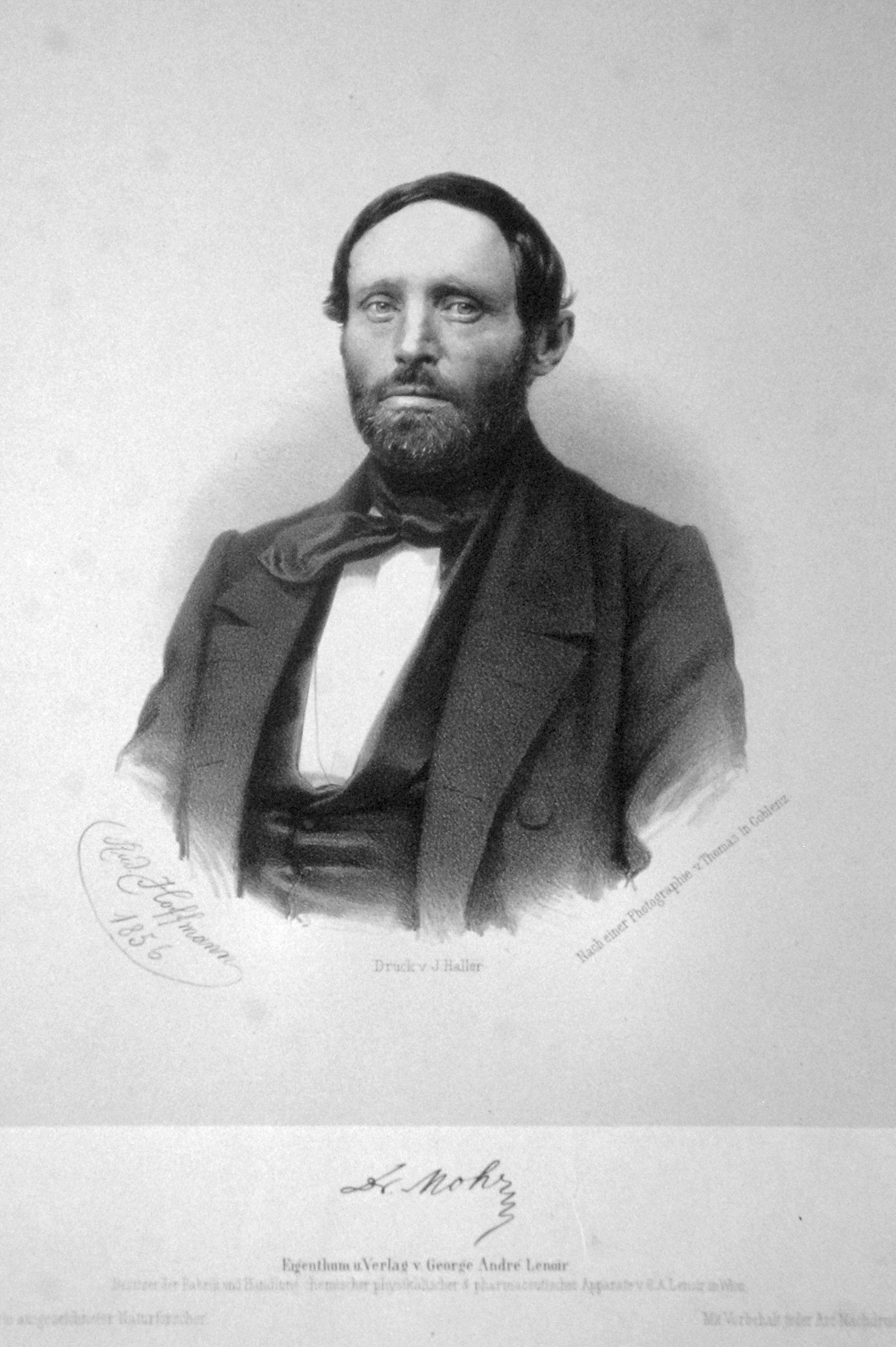 Karl Friedrich Mohr, (deutscher Pharmazeut), Lithographie von Rudolf Hoffmann nach einer Fotografie von Thomas (Koblenz); 1856